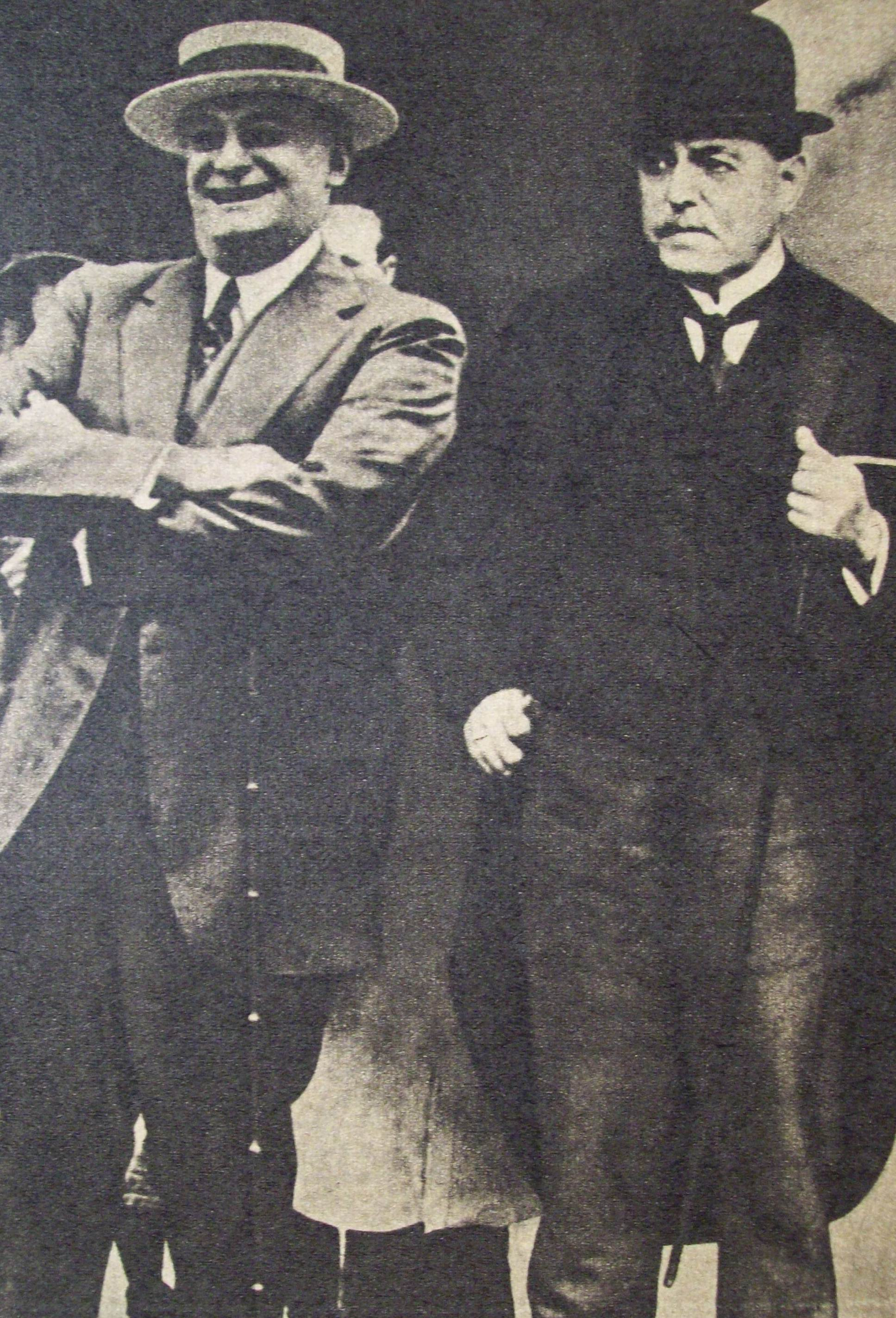 Marcelo Torcuato de Alvear con Hipólito Yrigoyen, líderes de la UCR en las primeras décadas de vida del partido (circa 1916)